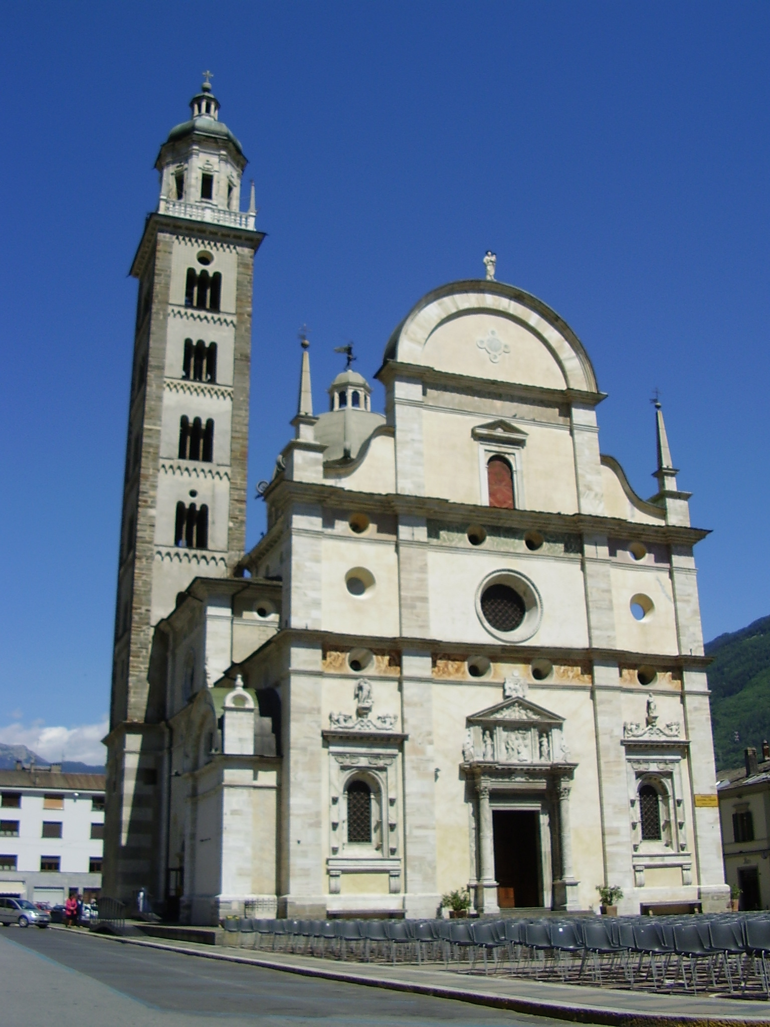 Sanctuary Madonna di Tirano